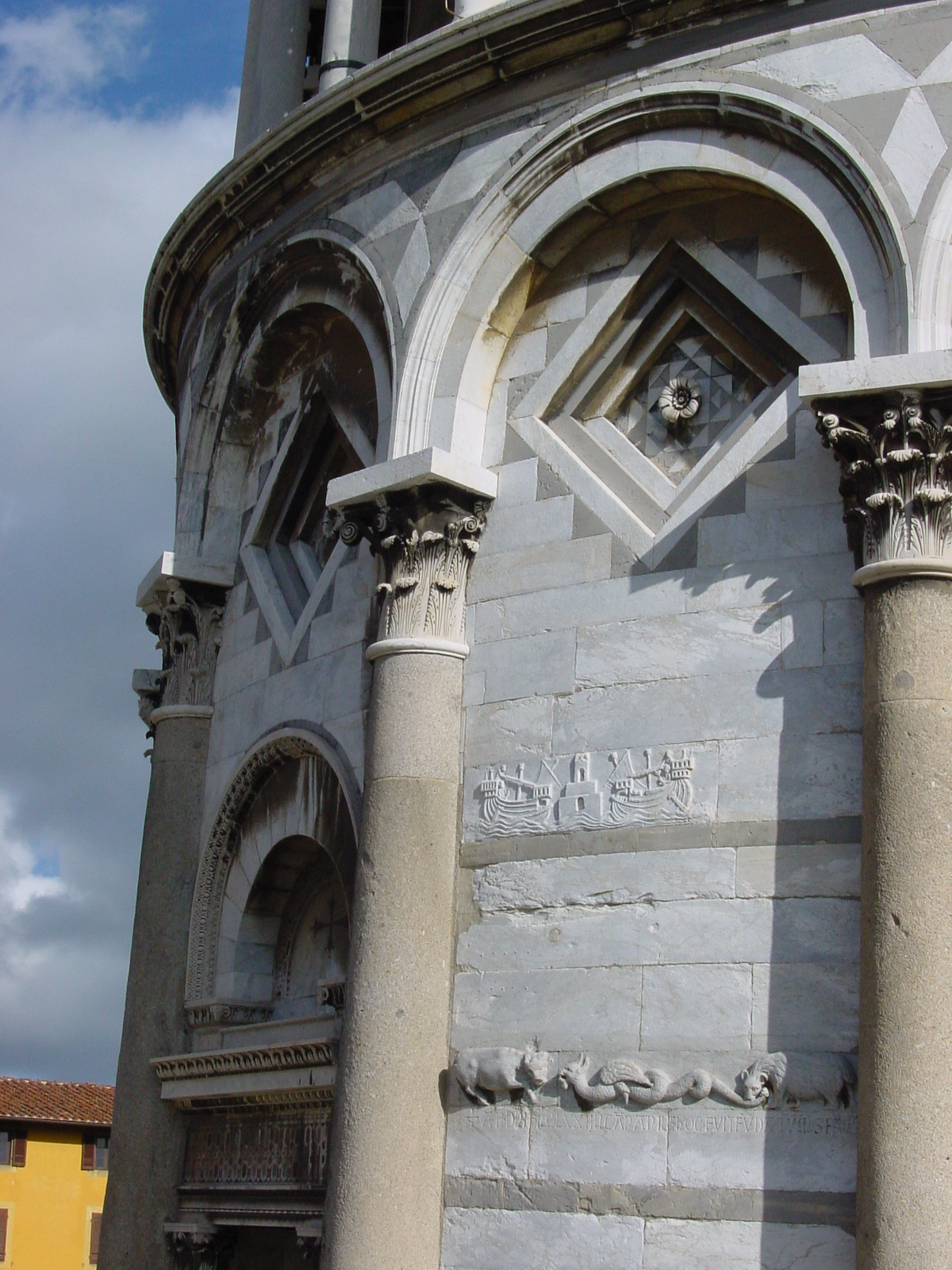 leaning tower in Pisa.